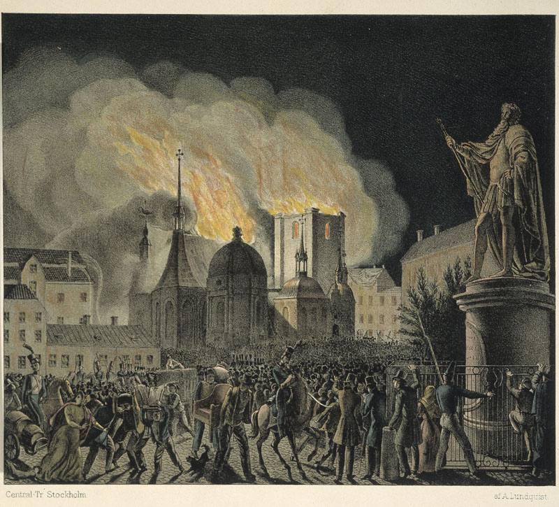 Tryckt på Central-Tryckeriet i Stockholm